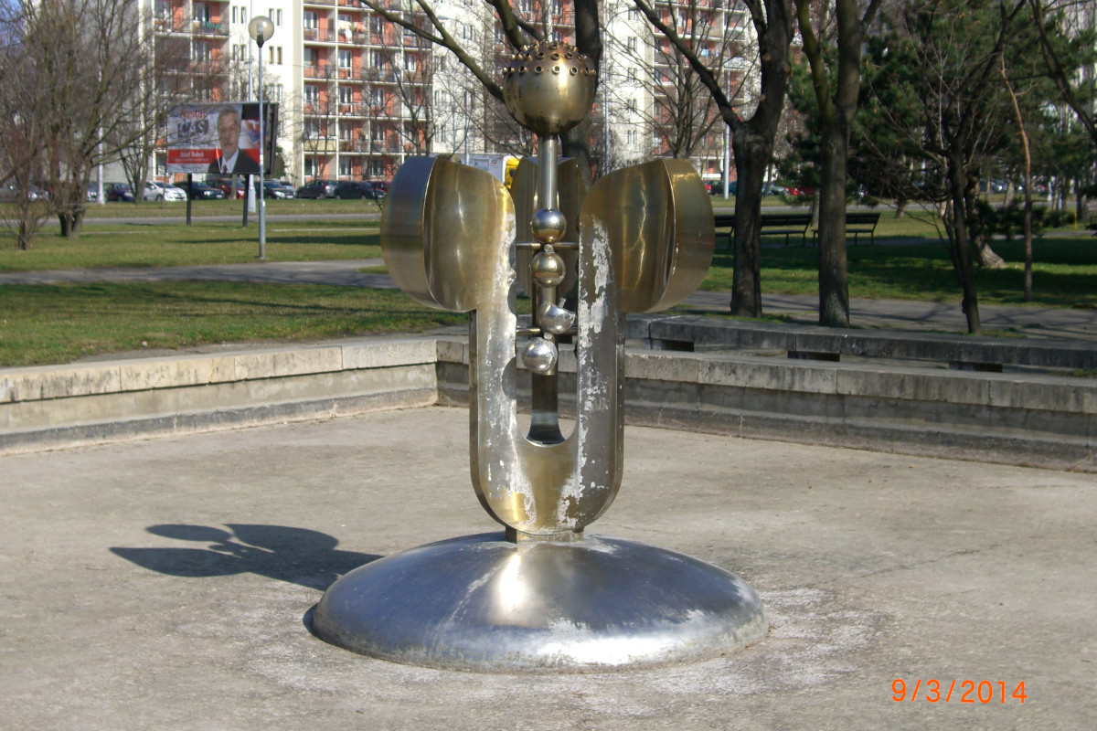 Fontana Maria - detail, Bratislava/Ruzinov/Posen